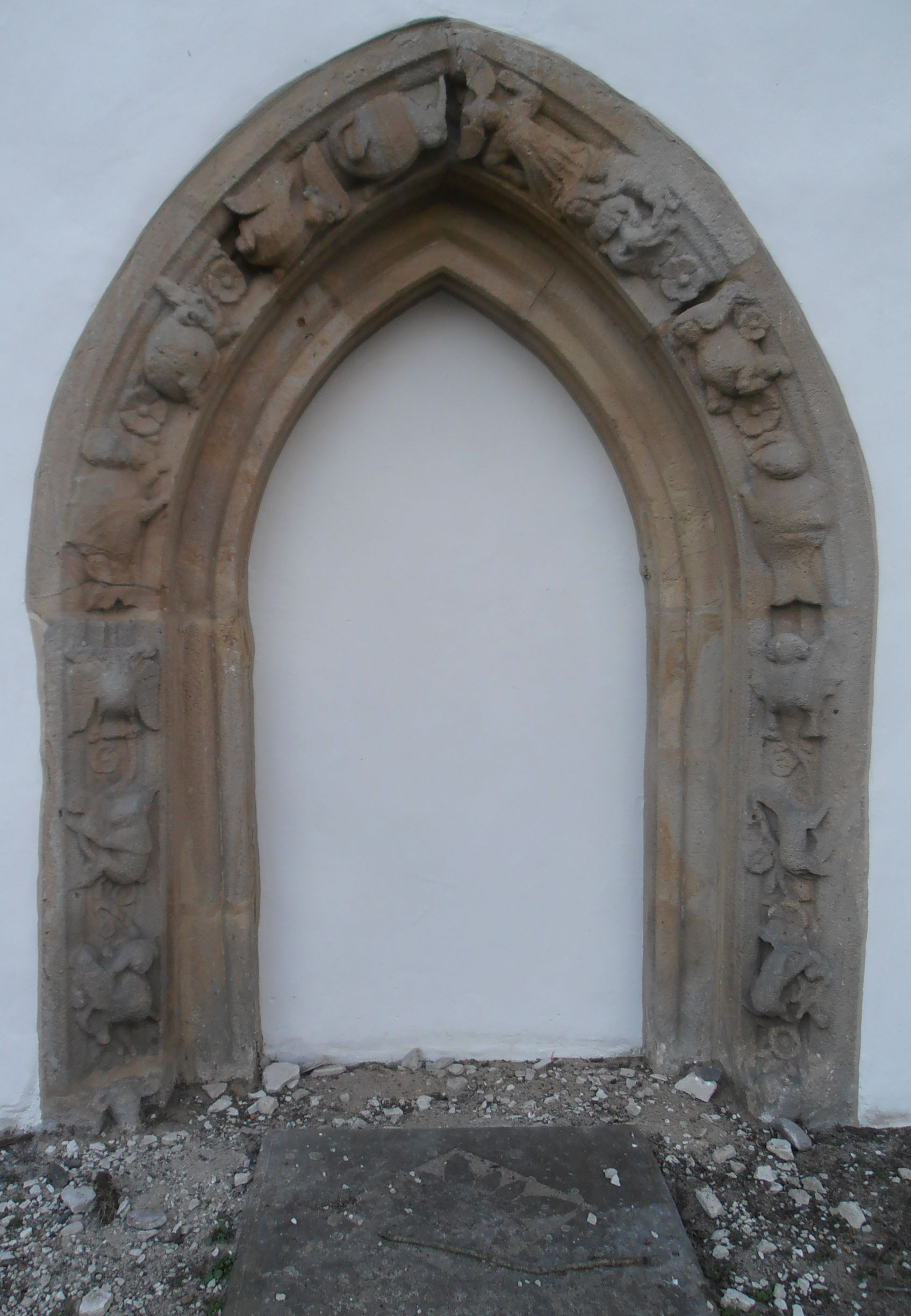 Seitenportal an der Marienkirche in Ueffeln im Norden des Landkreises Osnabrück in Niedersachsen